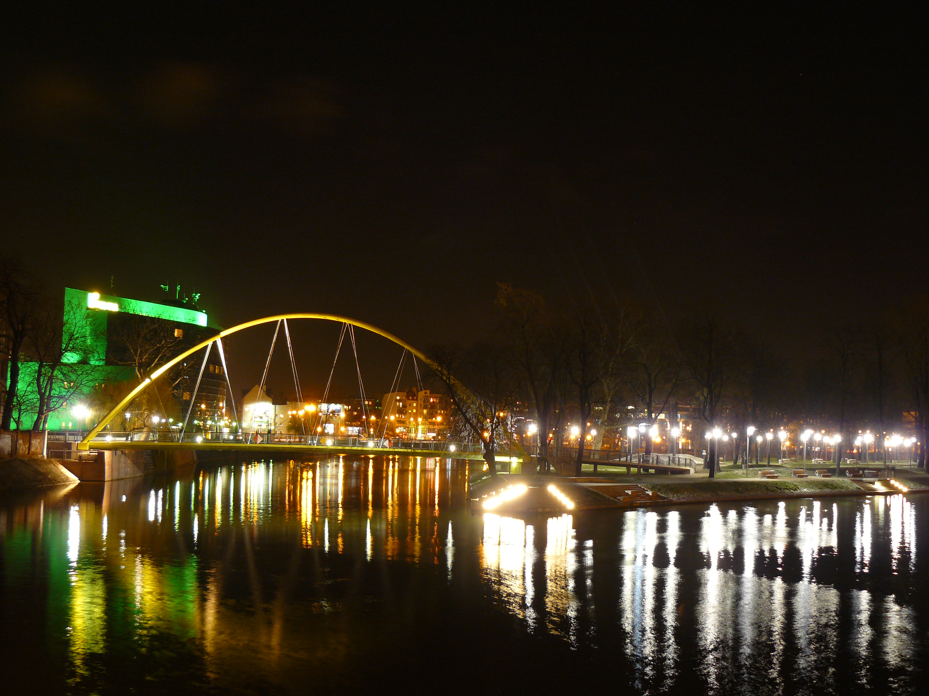 Wrocław - Kładka Słodowa, prowadząca do Wyspy. Widok spod rzeźby "Powodzianki".